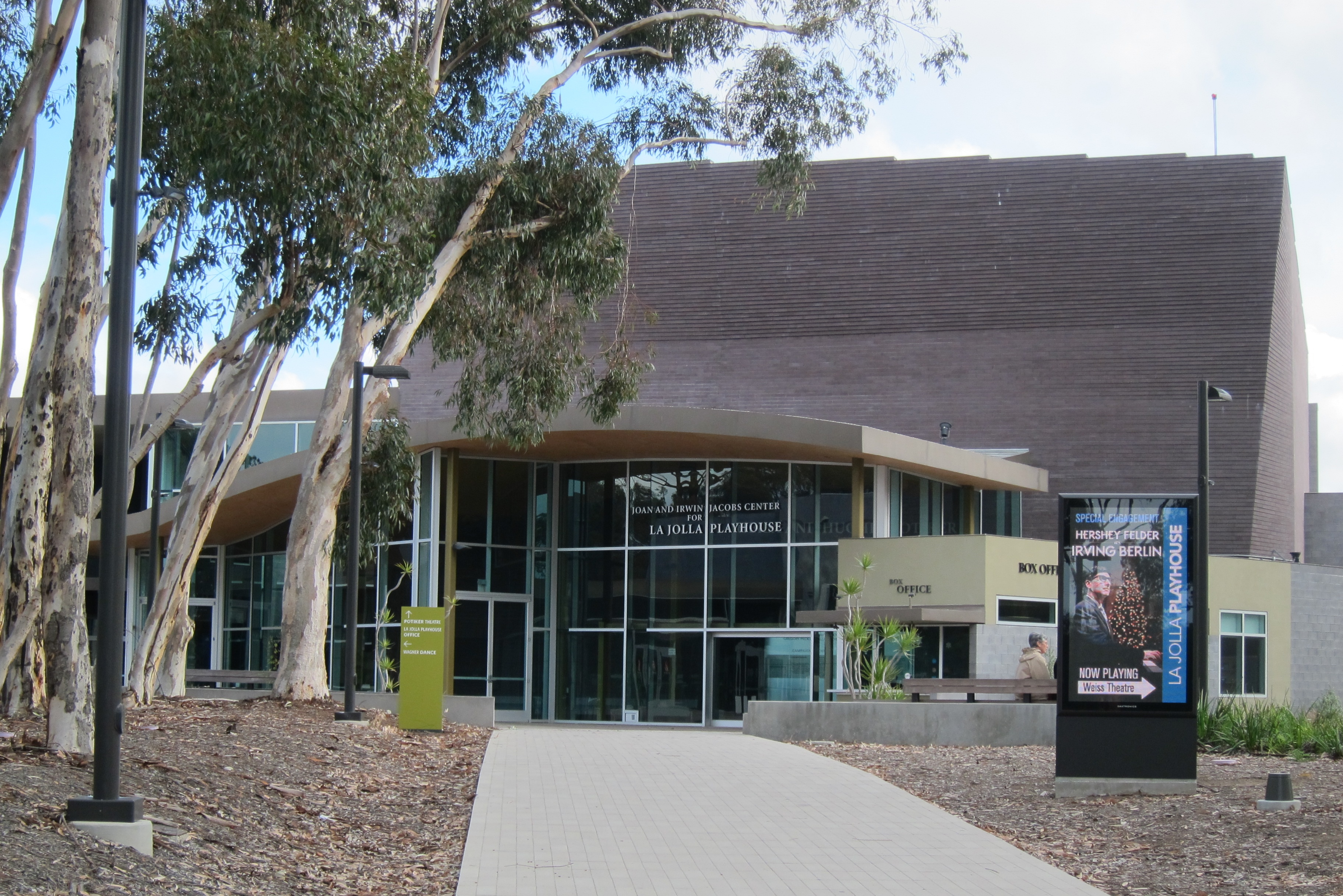 Torrey Pines, San Diego, CA, USA